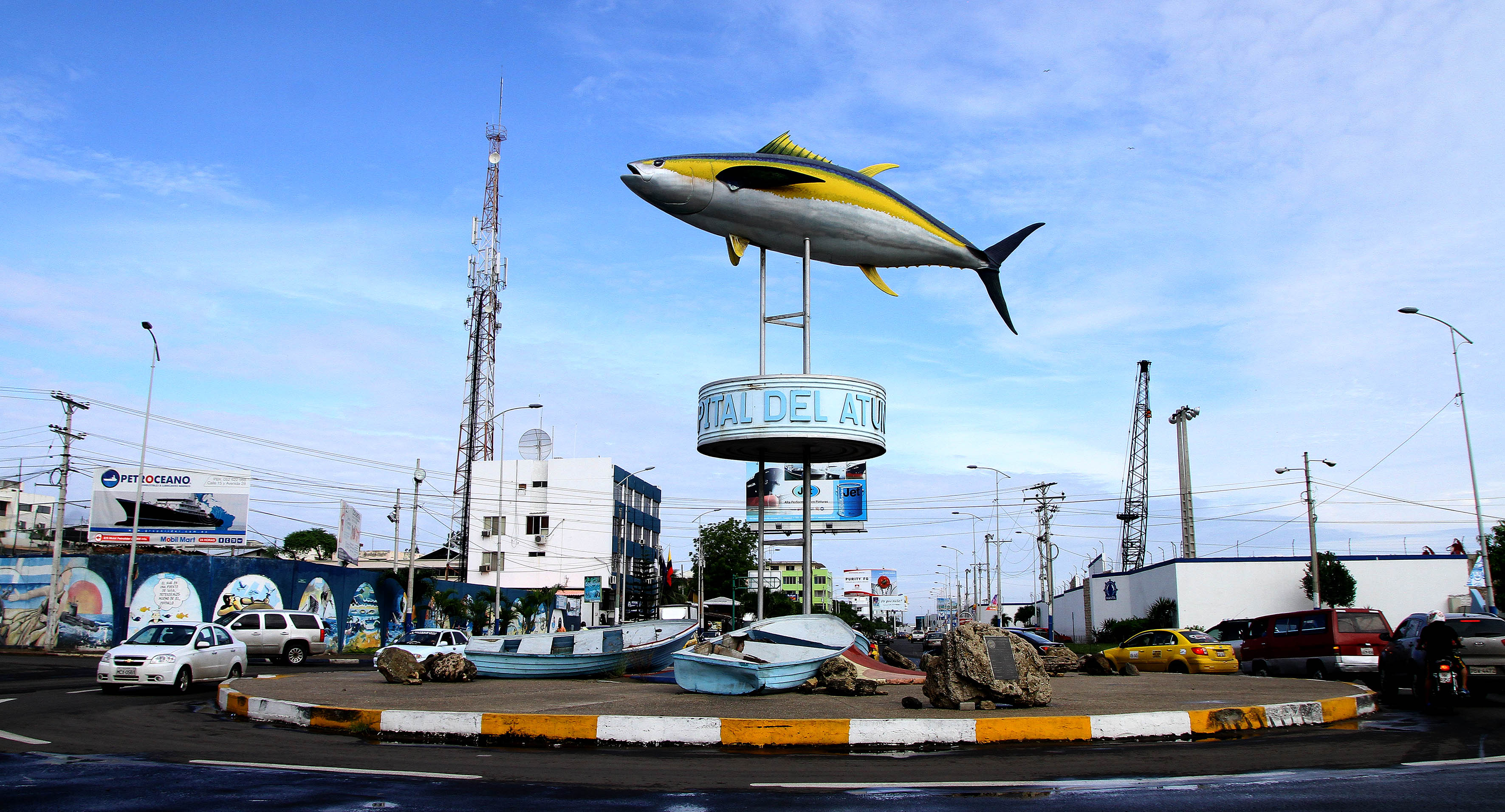 Conocida oficialmente como San Pablo de Manta, se encuentra localizada en la provincia de Manabí, asentada en una espléndida bahía, es visitada por turistas extranjeros y nacionales. El monumento al Atún es el símbolo del progreso económico. Foto:César Muñoz/Andes